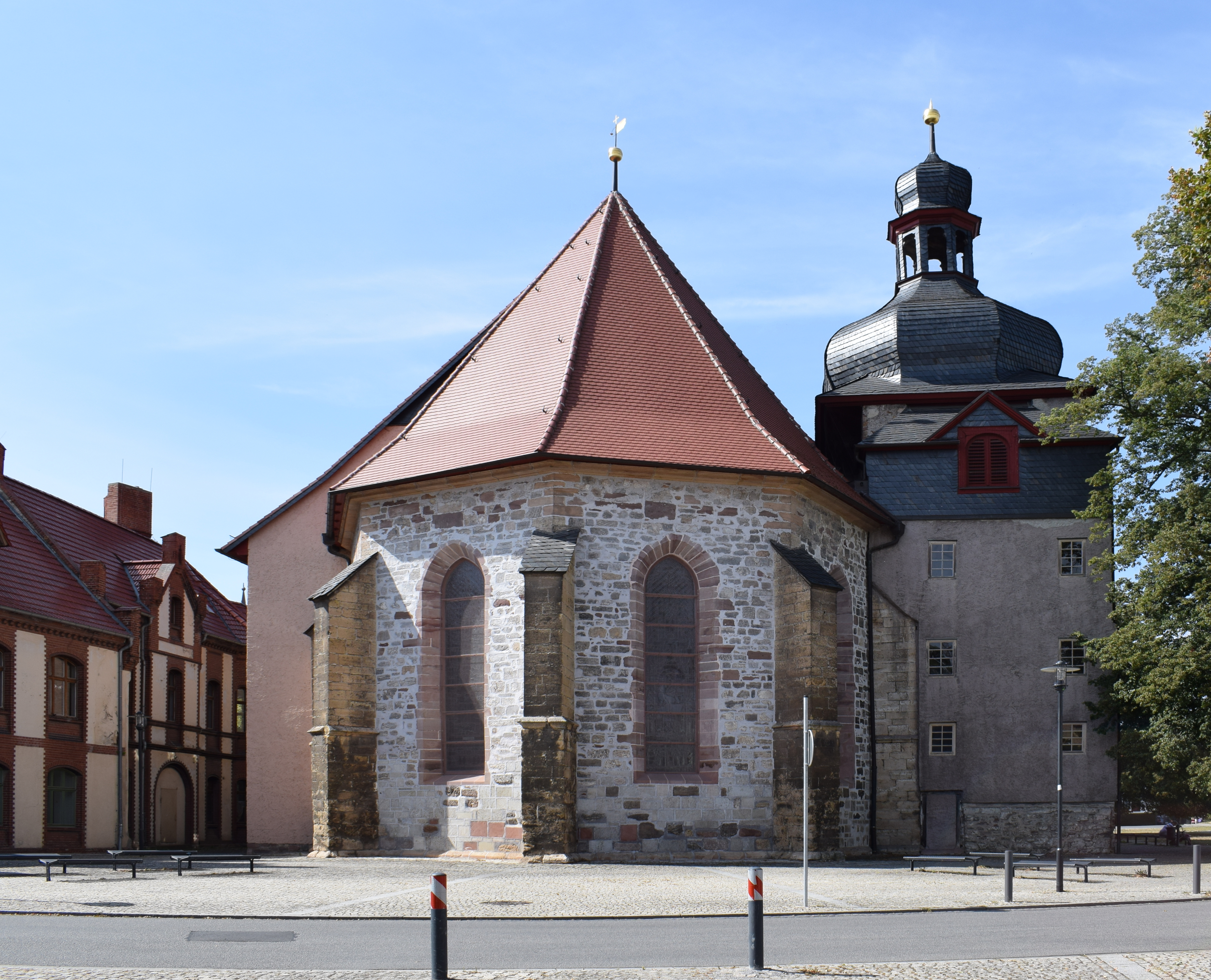 Die Unterkirche in Bad Frankenhausen, 1691-1701 am Standort einer Klosterkirche von 1215 erbaut. Förderprojekt der Deutschen Stiftung Denkmalschutz.